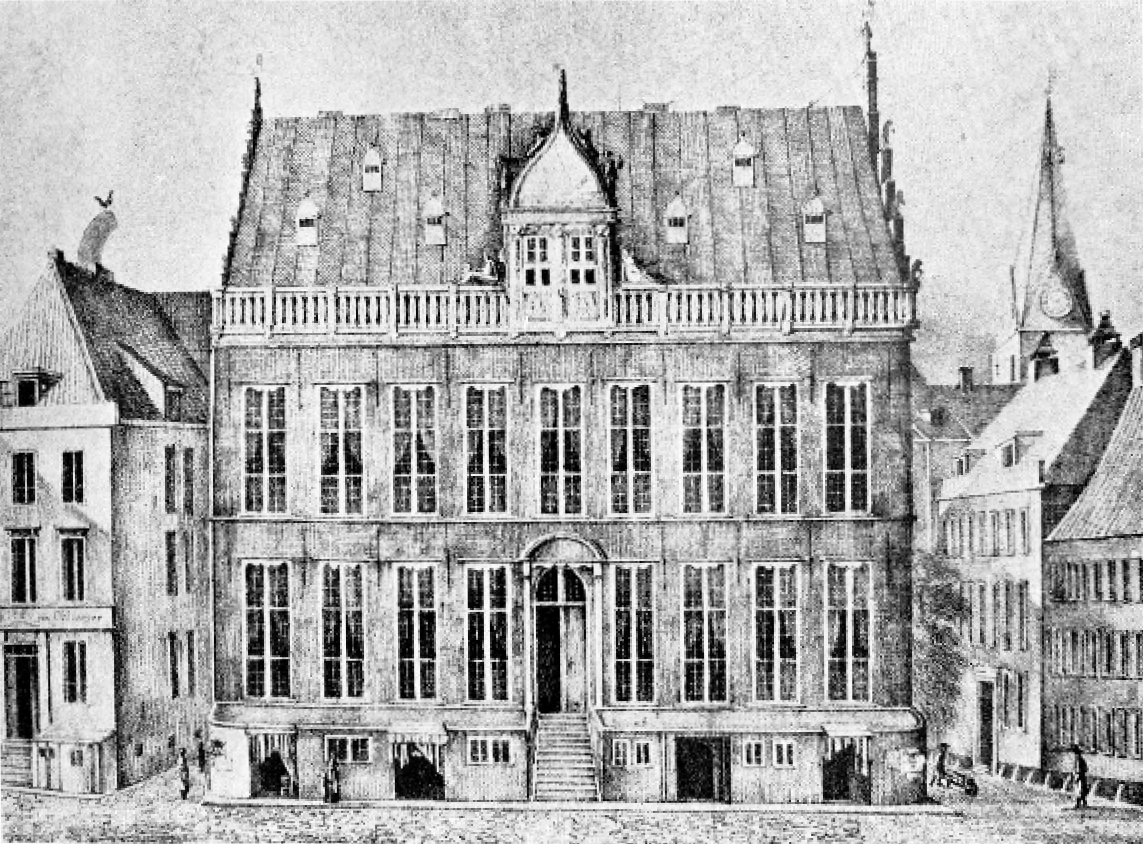 Schütting in Bremen in 1830, lithopraphy